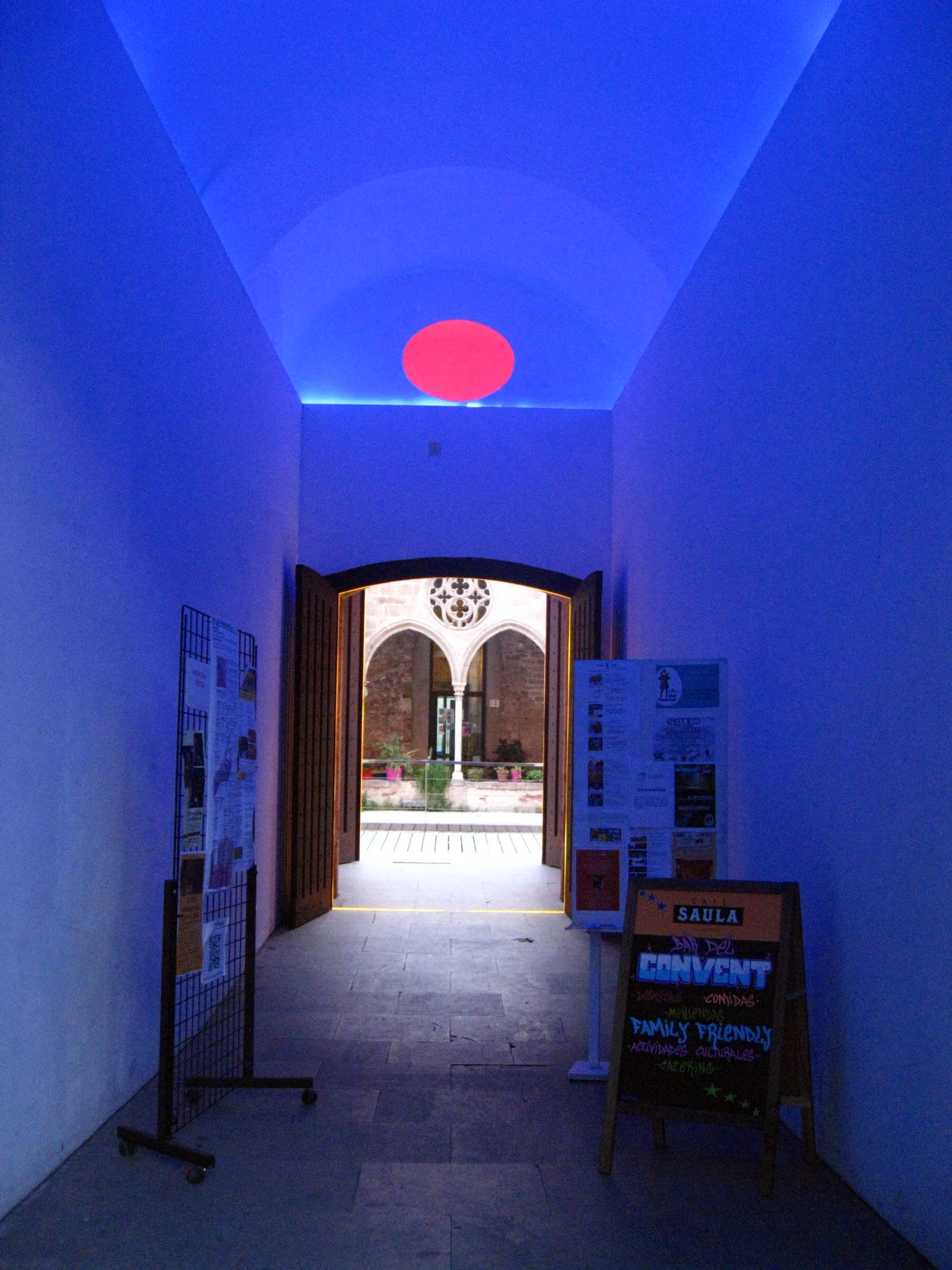 Configuracions Urbanes: Compartiment igualat (James Turrell). C. Comerç, 23 (antiga caserna de Sant Agustí) (Barcelona)